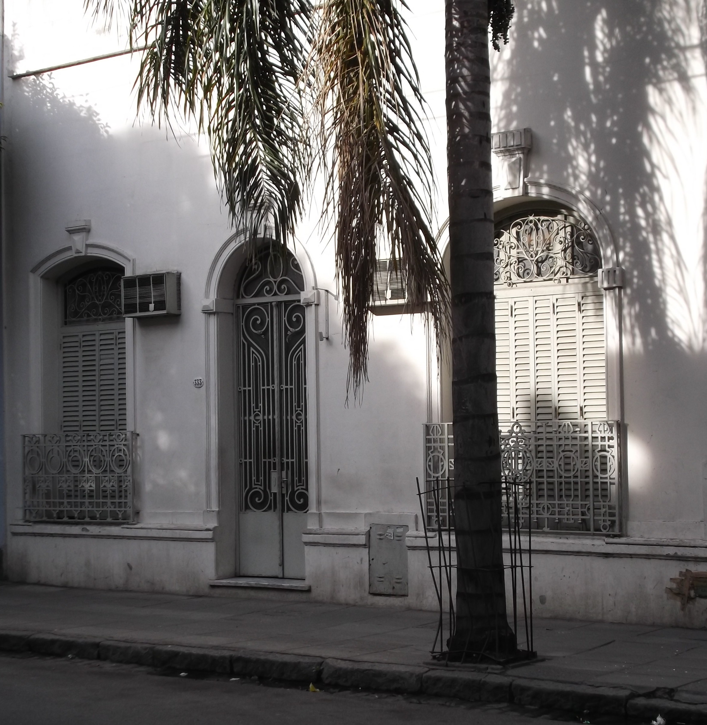 Sede del Instituto Nacional del Hielo Continental Patagónico